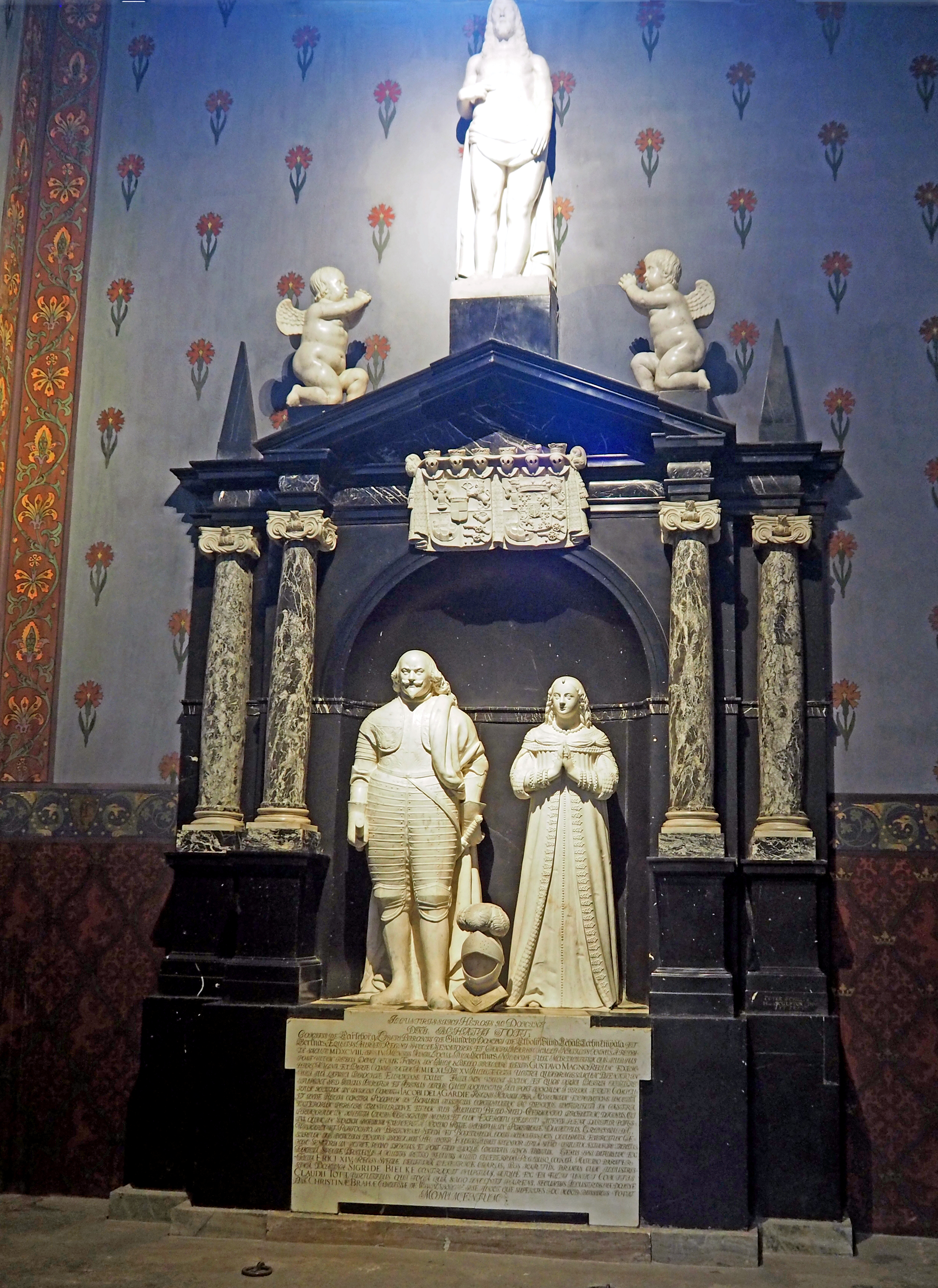 Grabmal von Åke Tott und Ehefrau im Dom von Turku